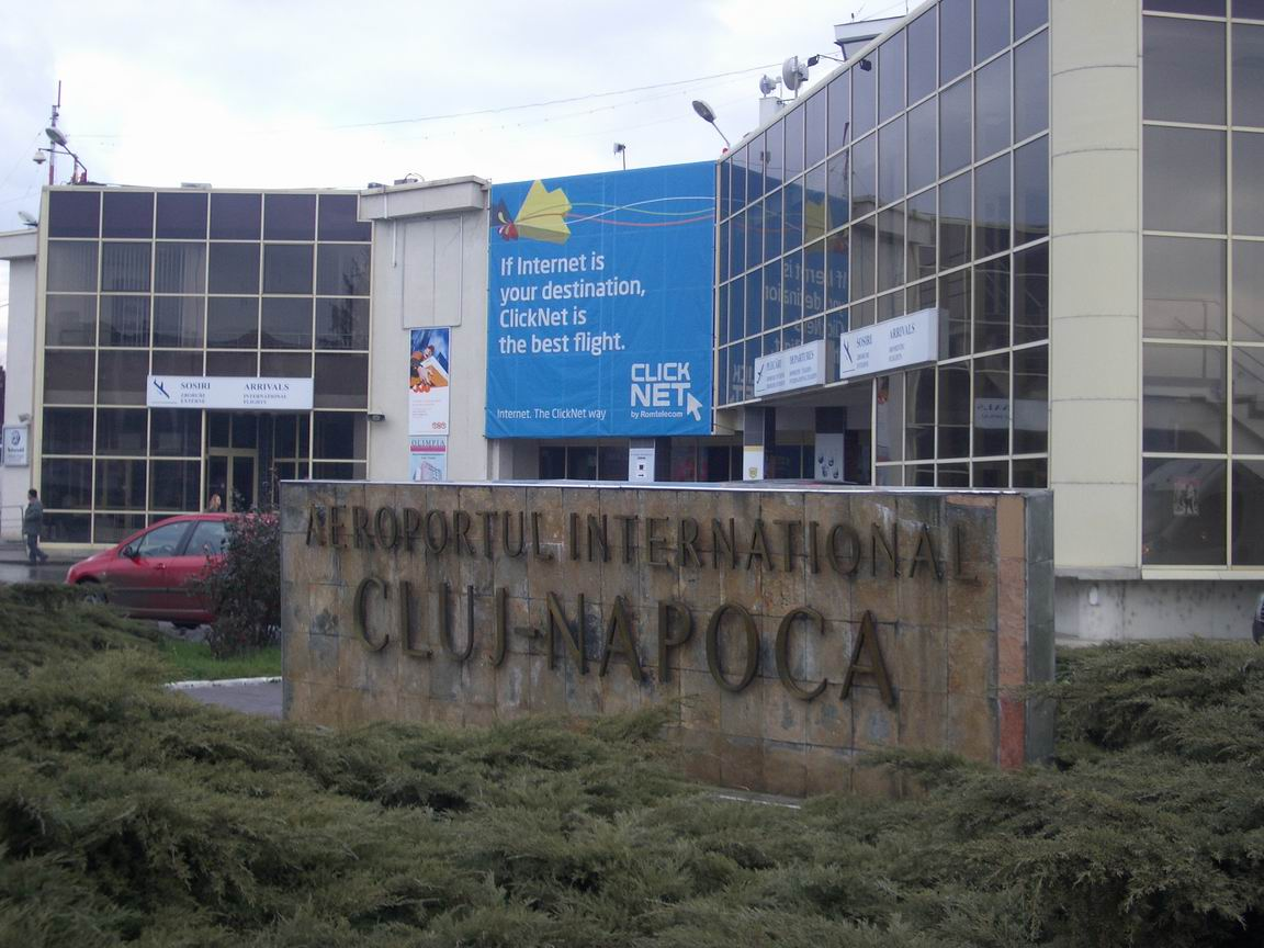 Cluj-Napoca International Airport (CLJ), Romania